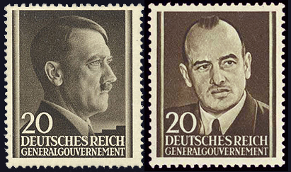 Почтовая марка Генерал-губернаторства (Польши), Адольф Гитлер, 20 грошей, 1941 год. Марка-пародия Великобритании, Ганс Франк, 20 грошей, 1943 год.